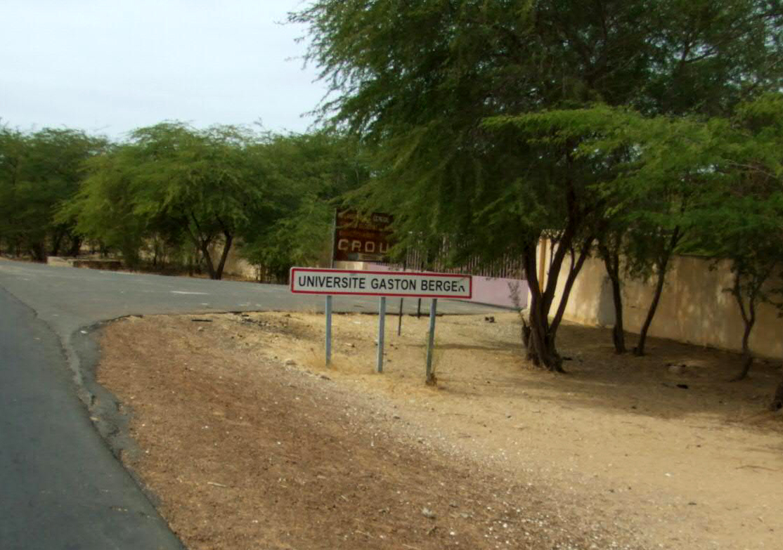 Entrée de l'Université Gaston Berger à Saint-Louis du Sénégal